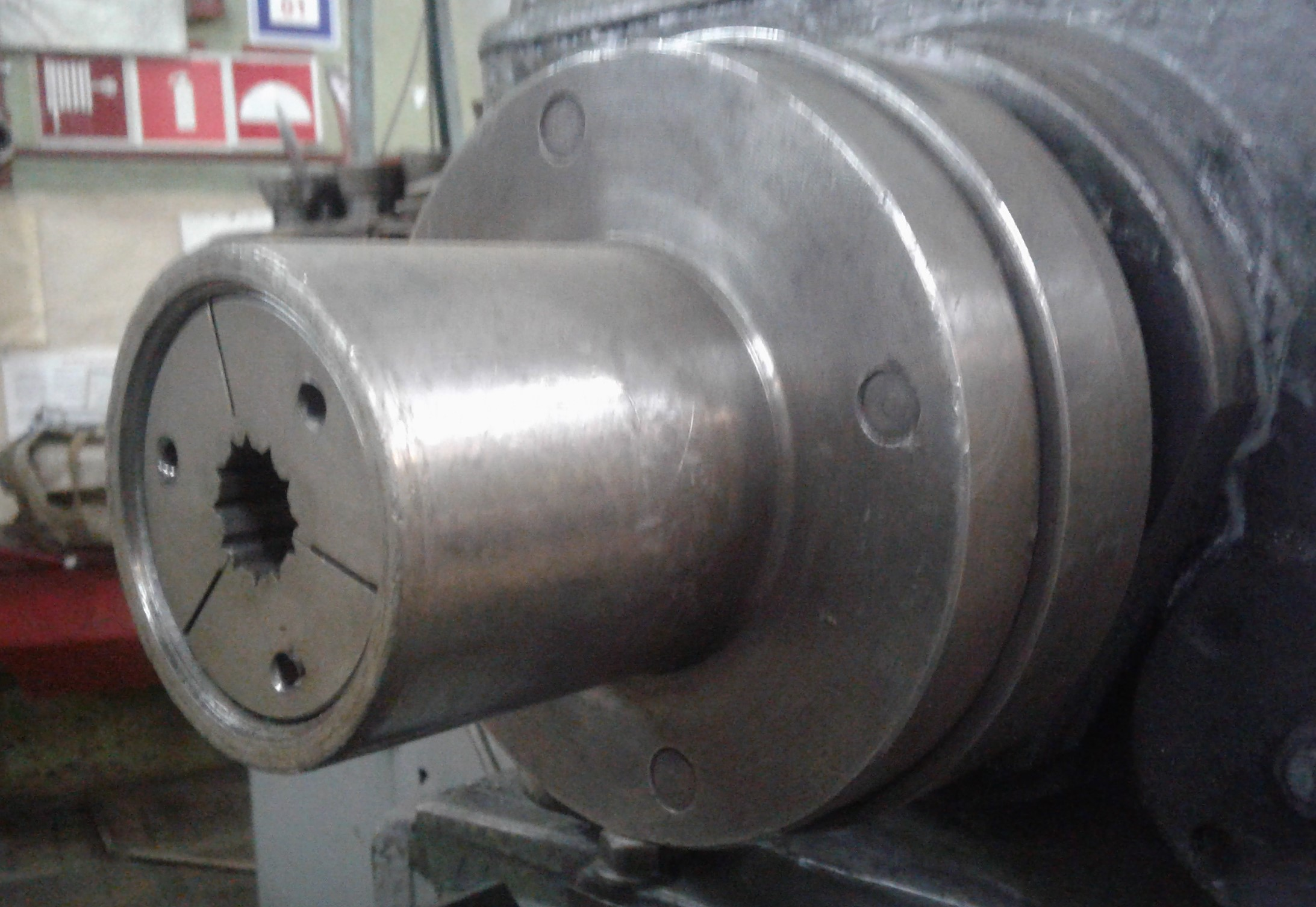 Цанговый патрон токарного станка.